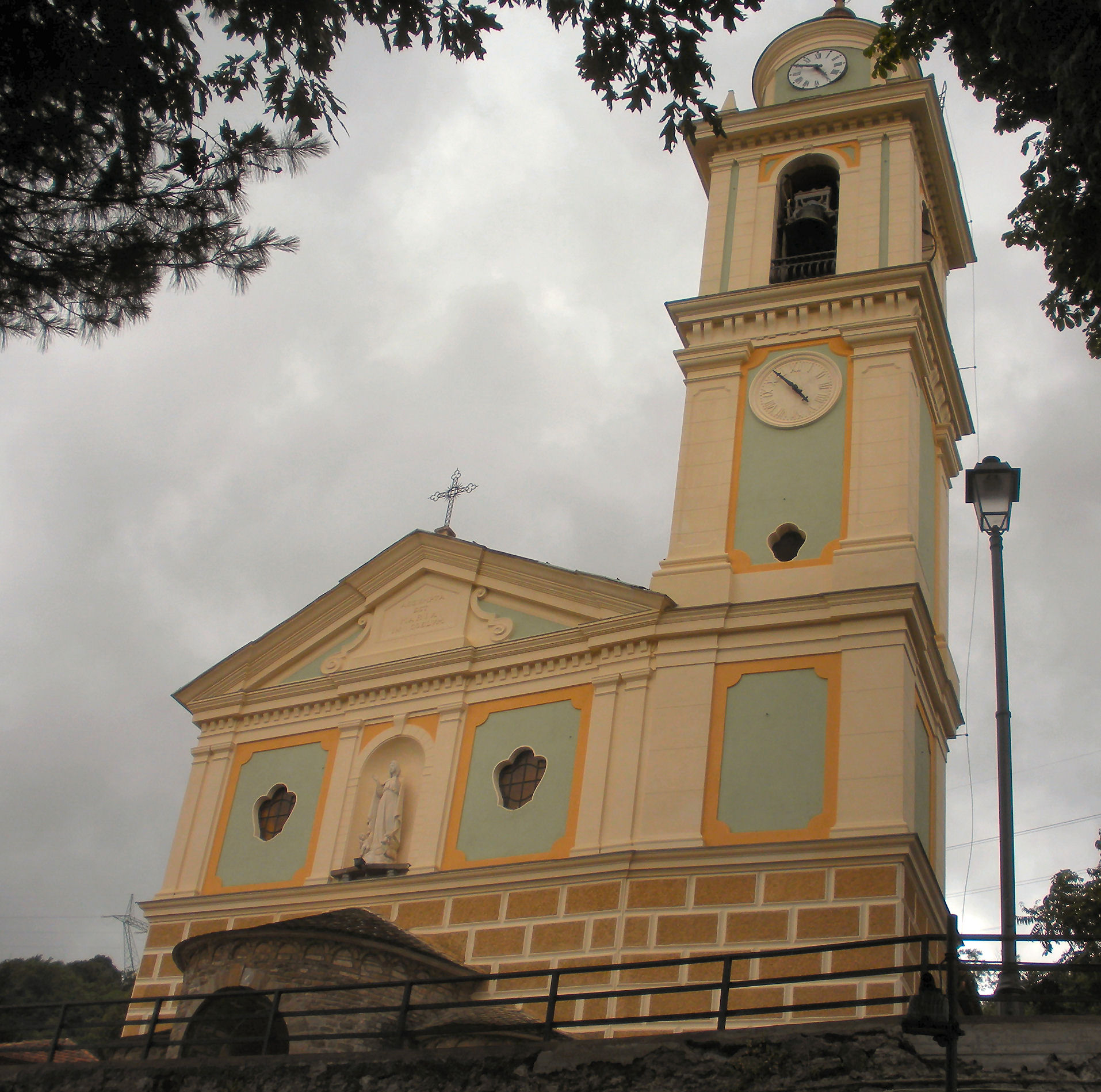 Chiesa di S. Maria Assunta (Loc. Gaiazza, Ceranesi - GE) Foto propria Giugno 2009